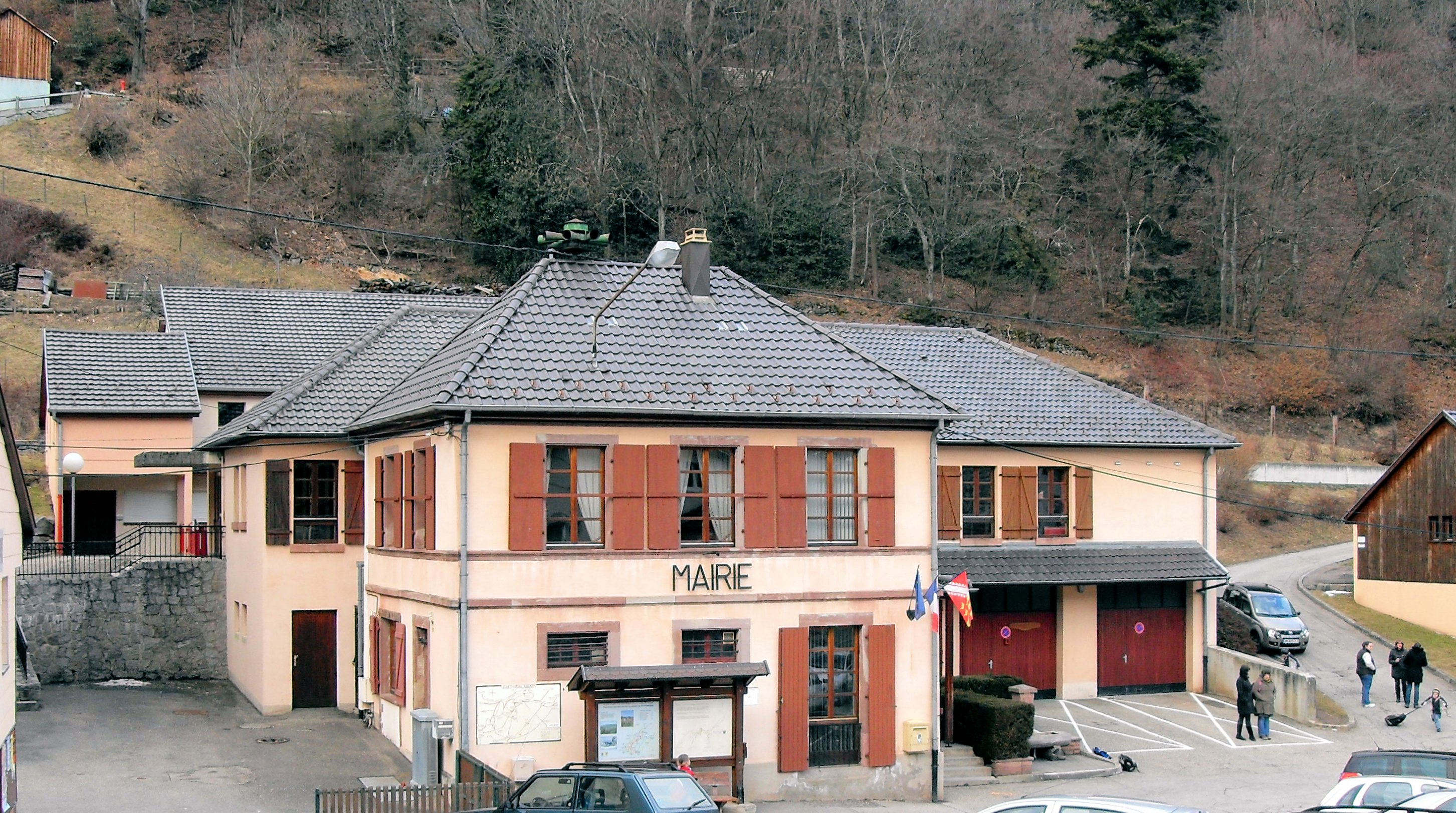 La mairie de Wasserbourg